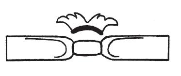 Houhamer : wapen Societeit Quintus Leiden